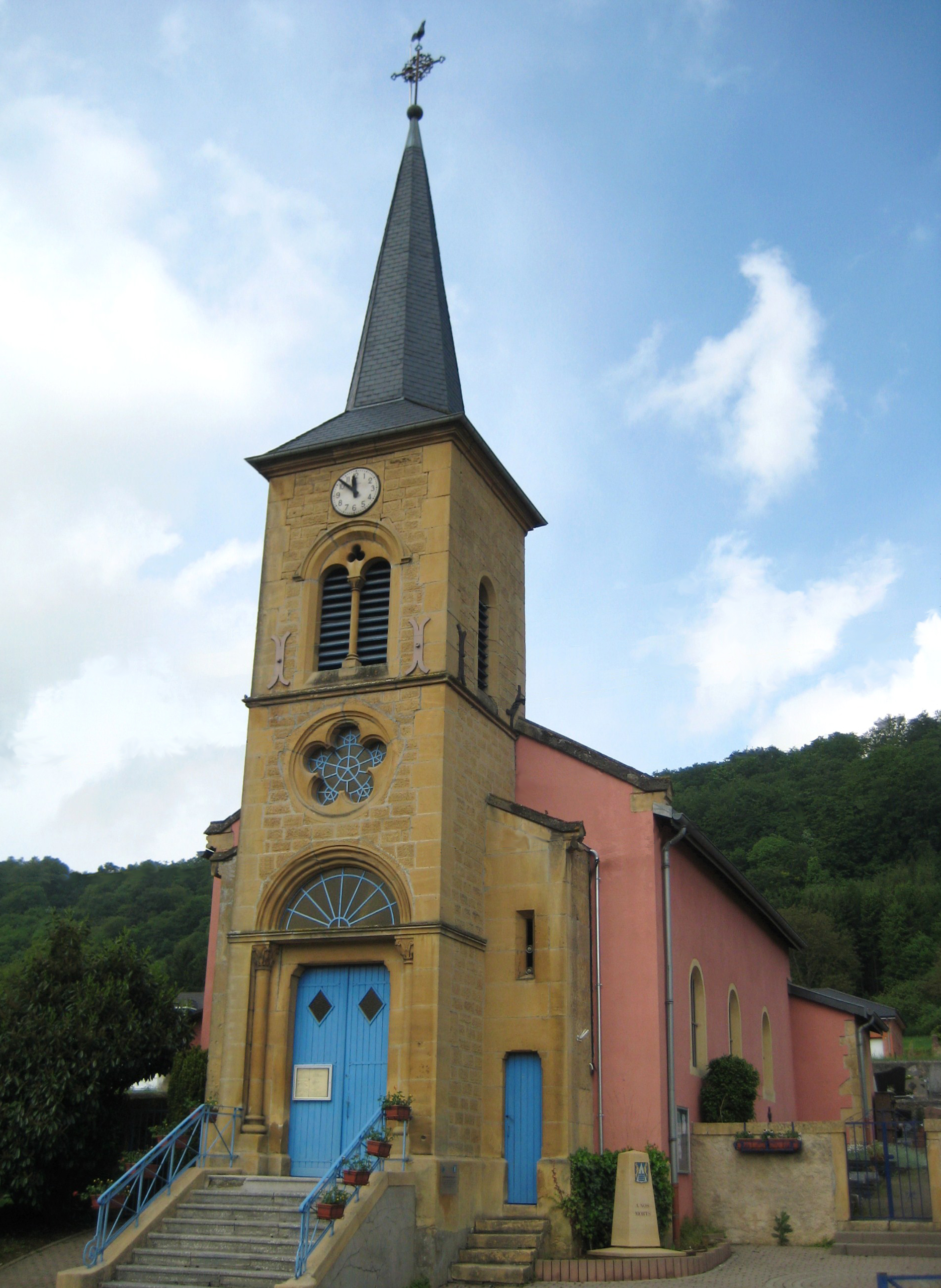 Église de Bronvaux, France